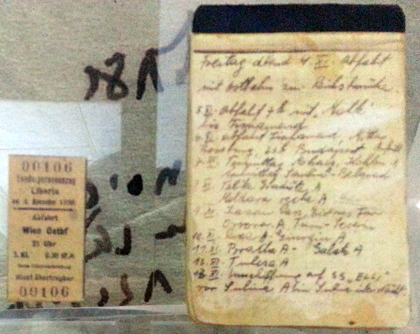 יומן מסע וכרטיס רכבת של מרדכי גרינפלר, מעפיל באוניית המעפילים 'אלי' - מוצג בתצוגת קבע במכון ז'בוטינסקי בתל אביב